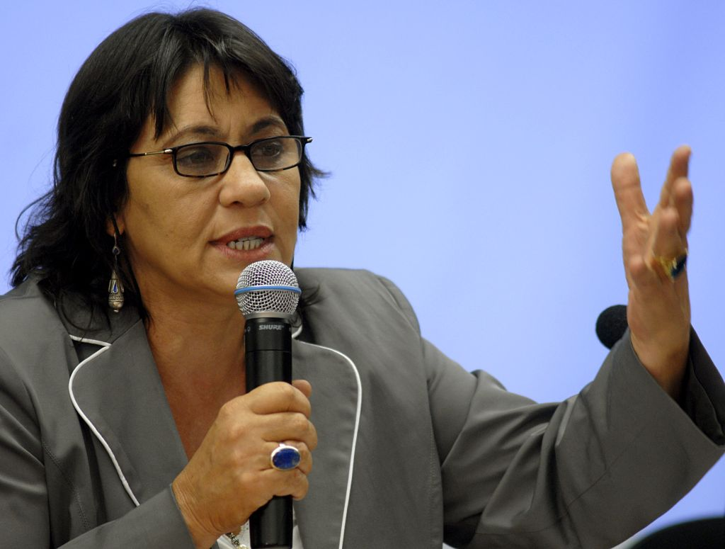 The Brazilian journalist Tereza Cruvinel